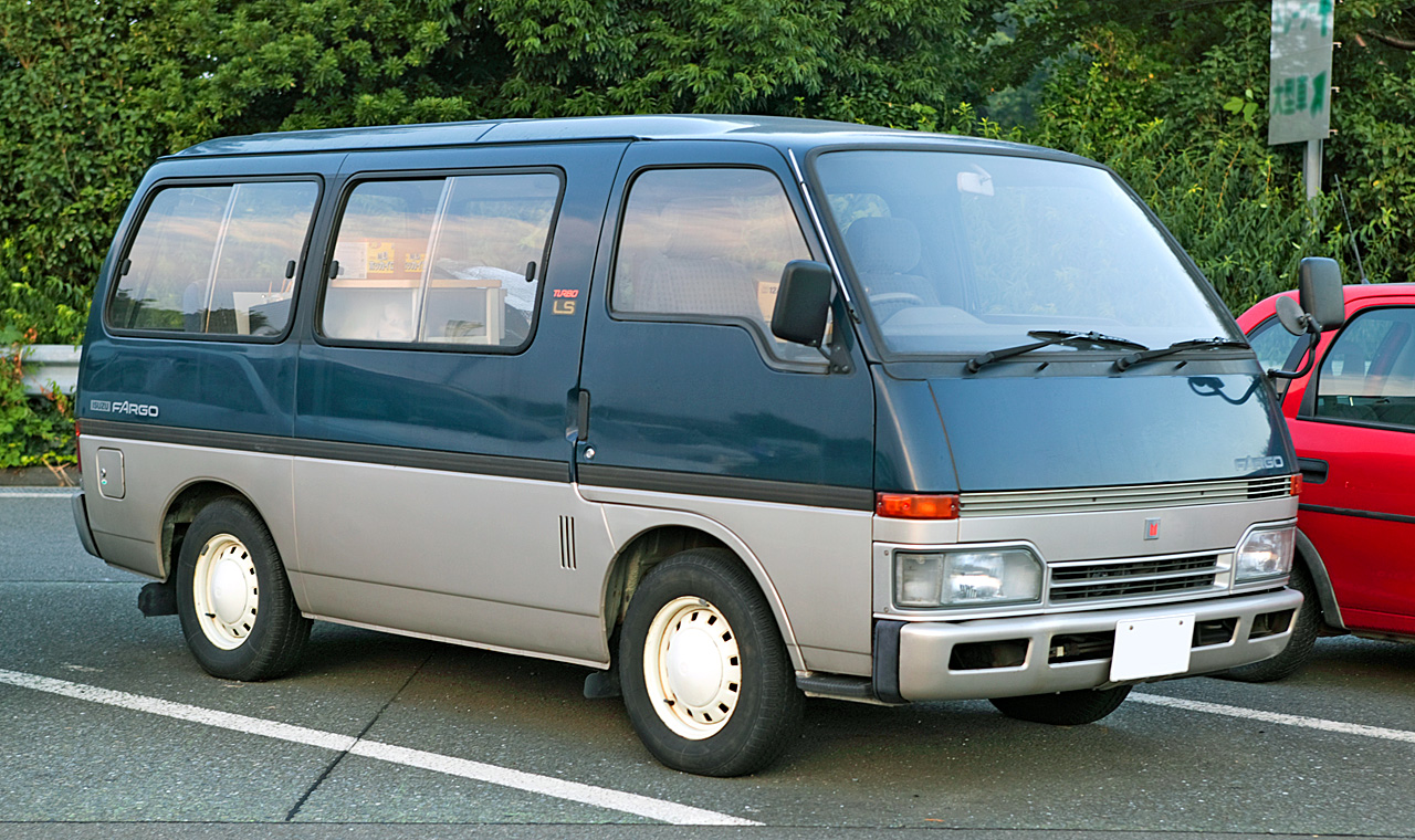 Isuzu Fargo Wagon 2.4TD LS